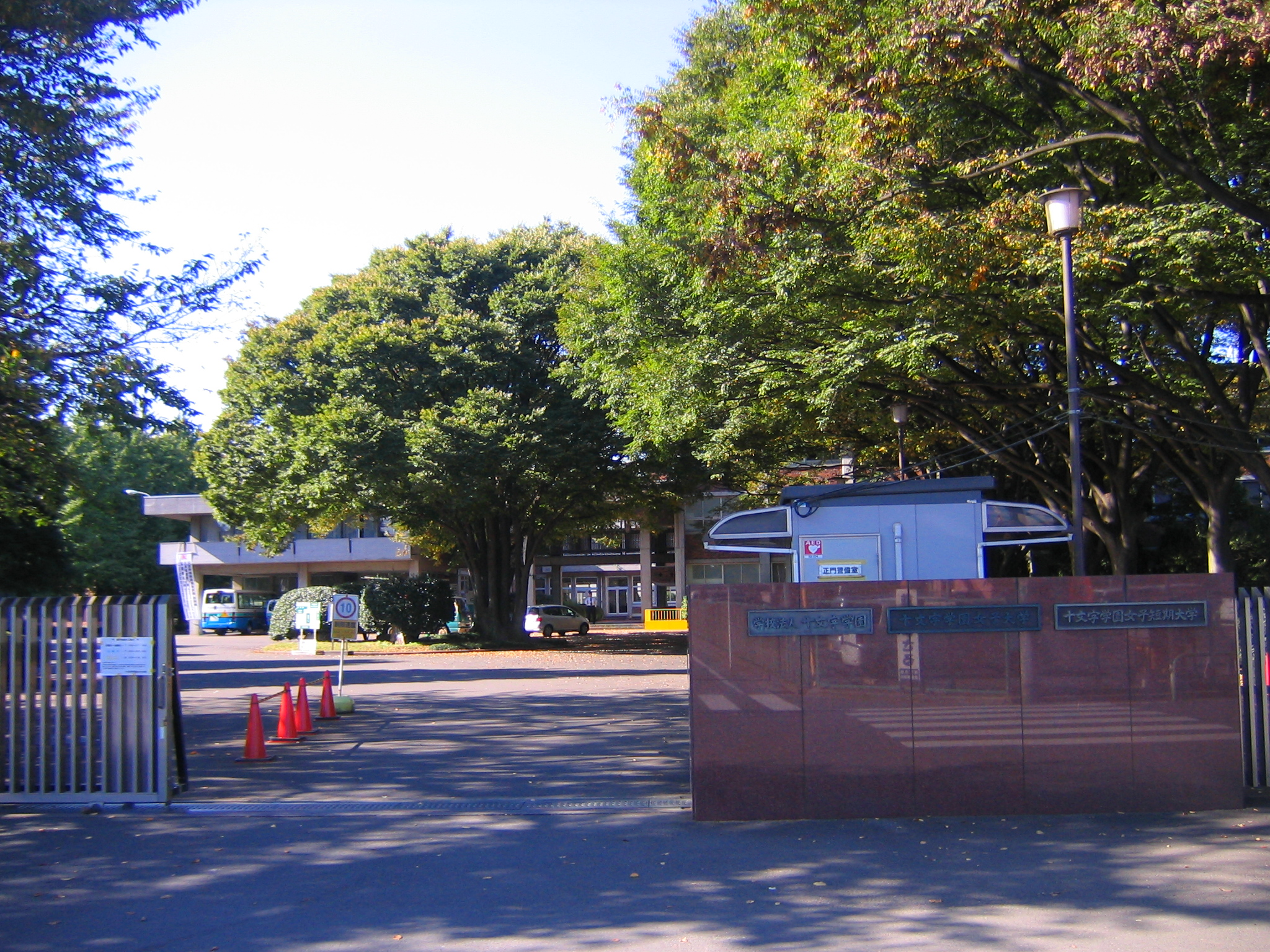 十文字学園女子大学